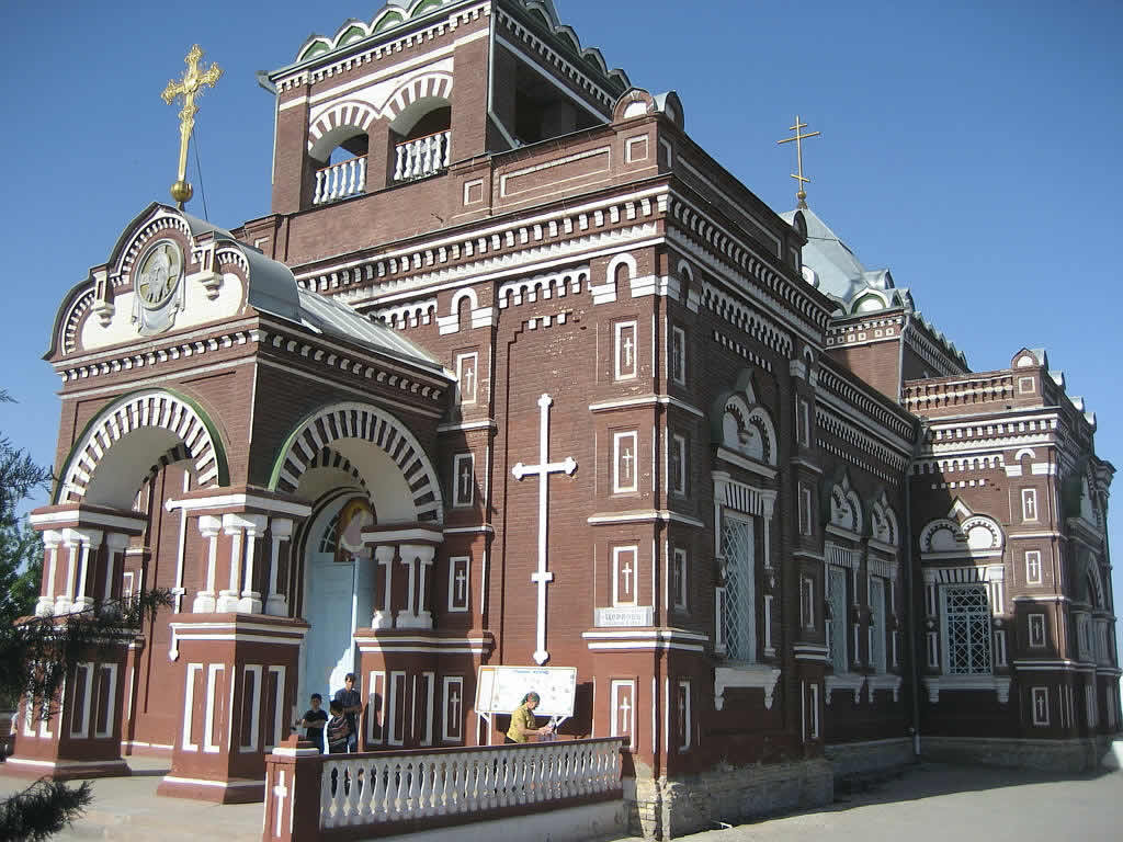 Pokrovkaya Church, Mary, Turkmenistan